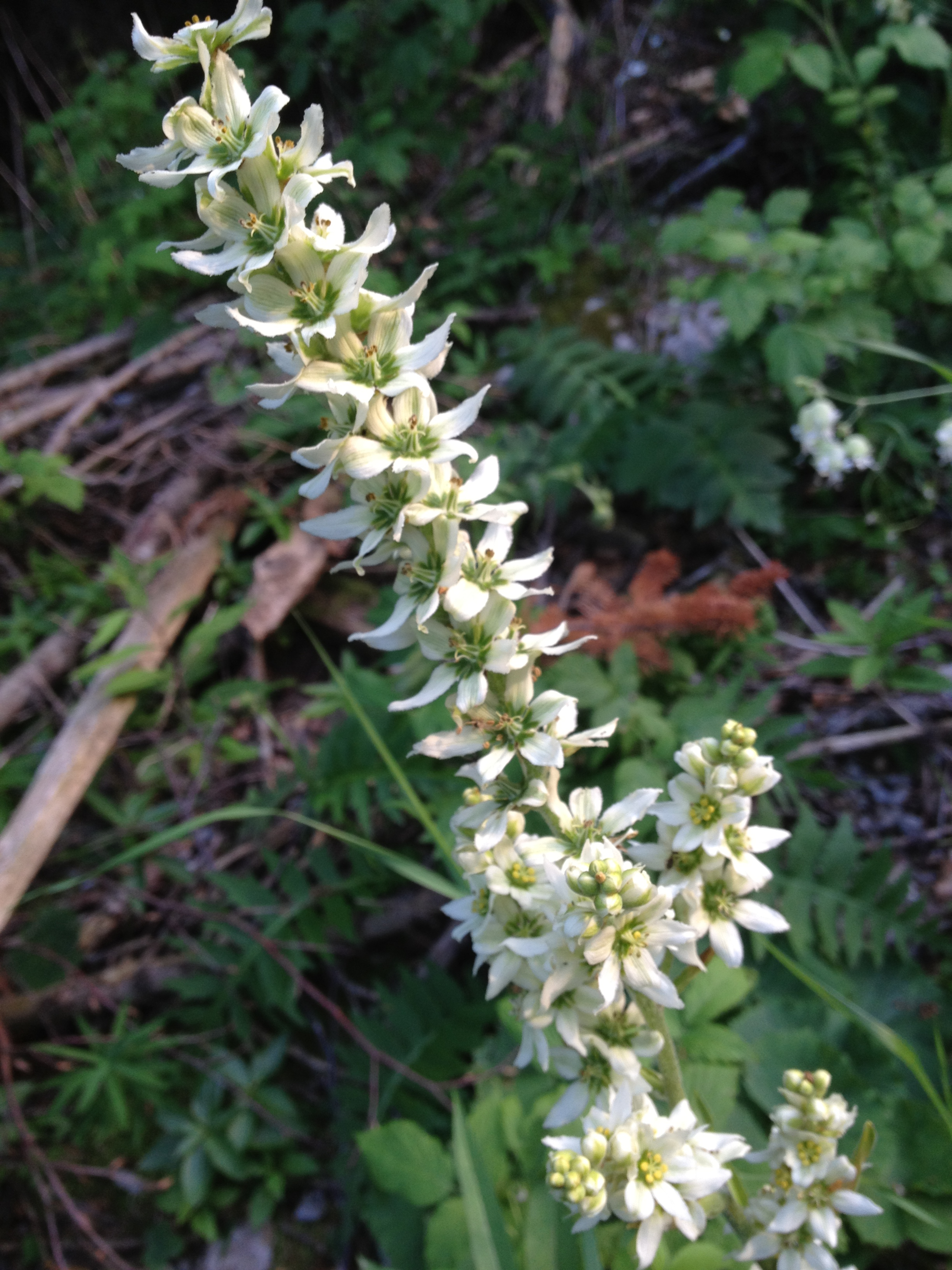 Veratum_album